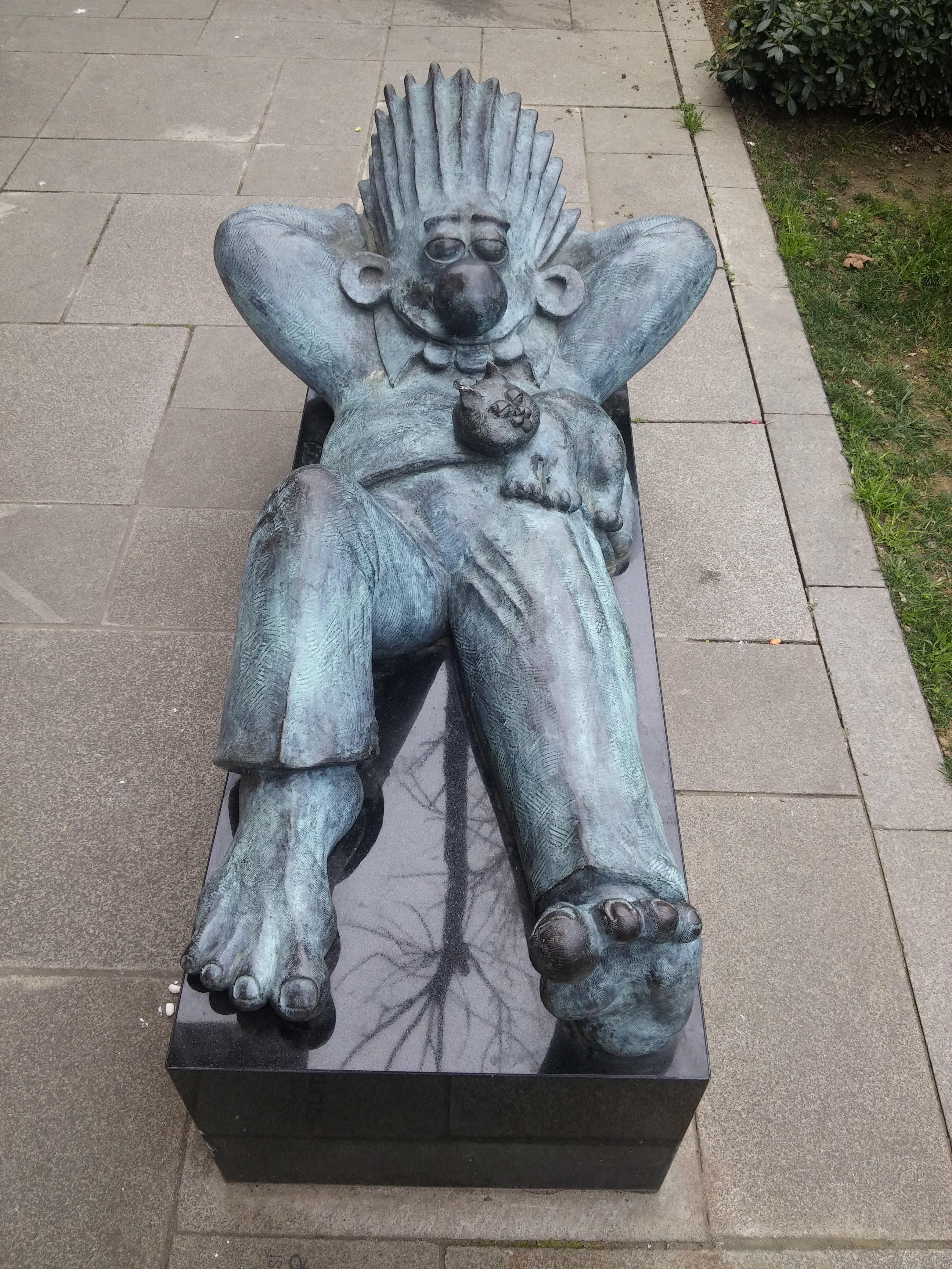 Tuncay Akgün'ün karikatür karakteri Bezgin Bekir'in Kadıköy Belediyesi Karikatür Evi'nin önündeki heykeli